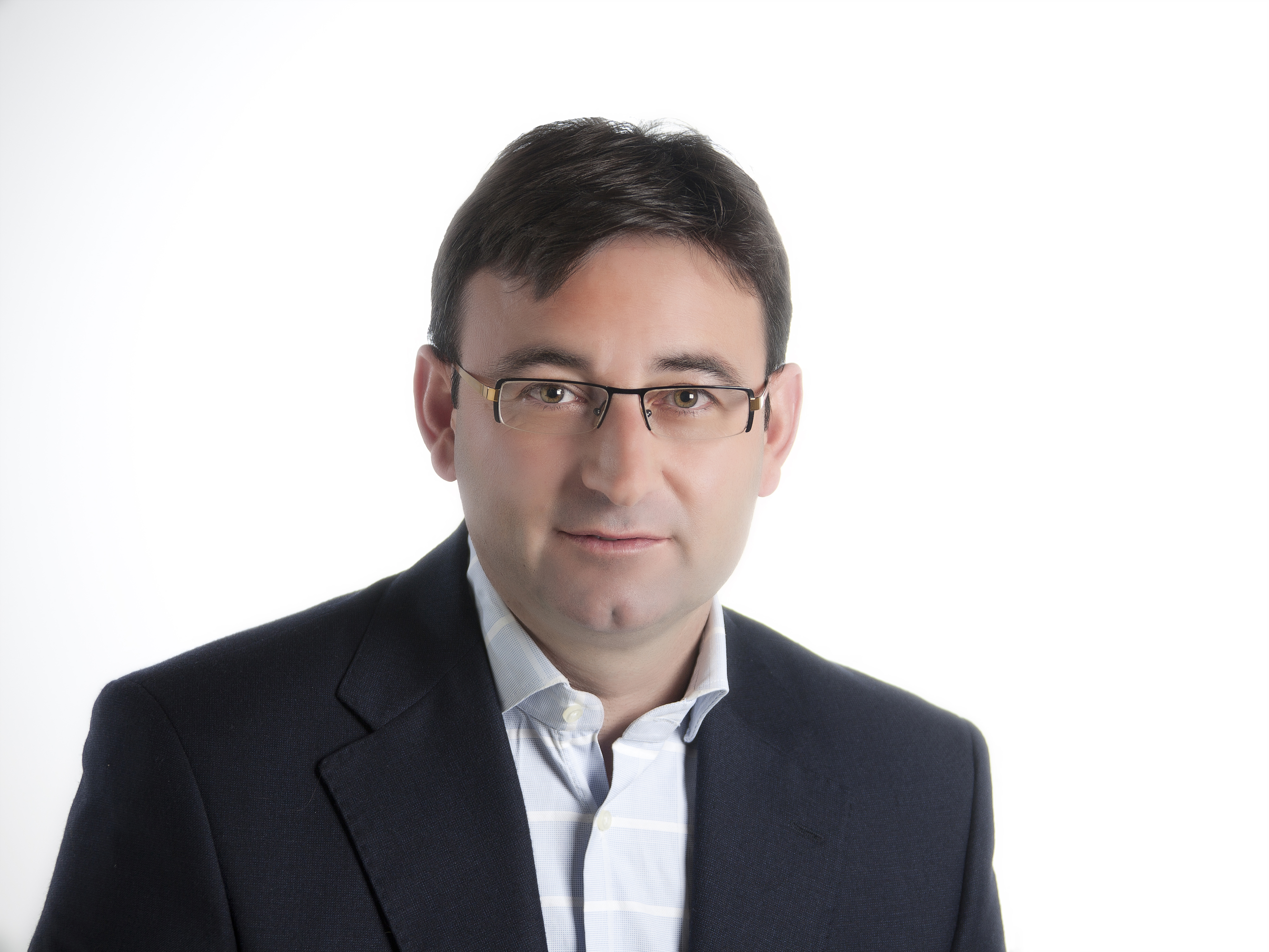 Daniel Martínez Sáez, es el Coordinador Regional de Izquierda Unida en Castilla-La Mancha.